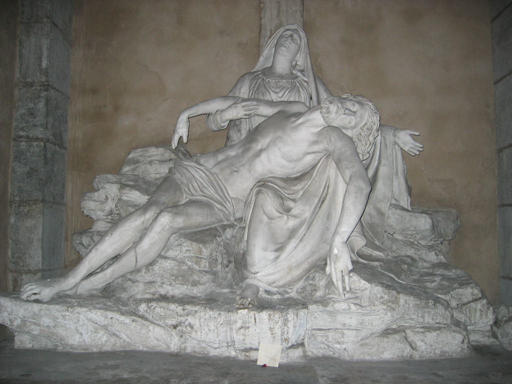 Sculpture biblique du sculpteur Auguste Clésinger à l'Église de la Madeleine de Besançon en Franche Comté - France